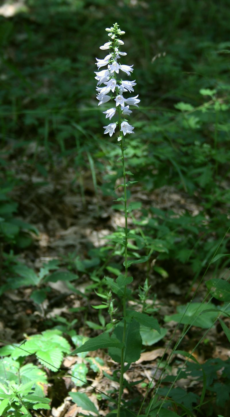 Filz-Glockenblume (Campanula bononiensis), Glockenblumengewächse (Campanulaceae) - Österreich/Austria/Autriche: Niederösterreich, Wiener Becken, Goldwald W Ebergassing